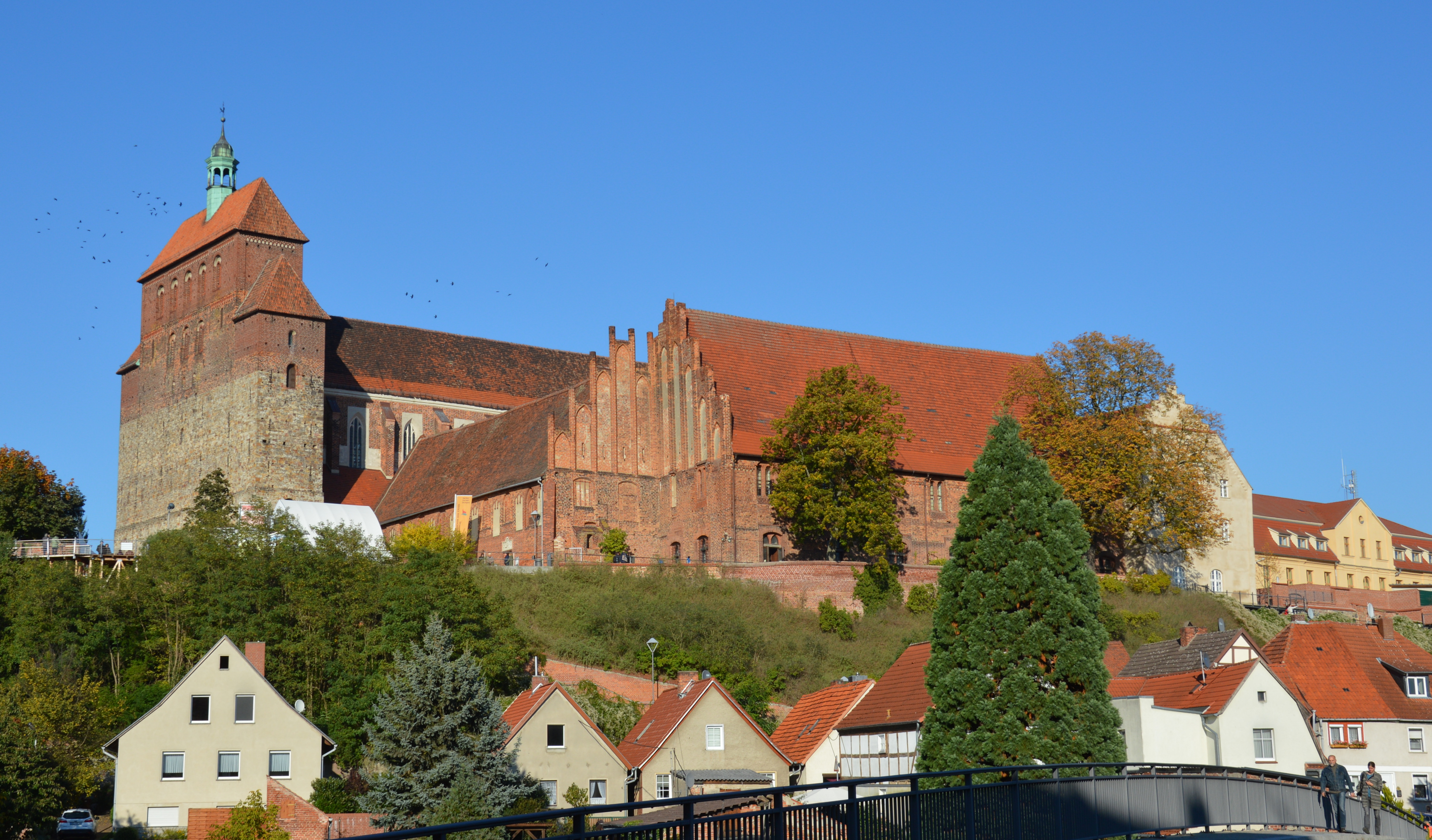 Domberg Havelberg